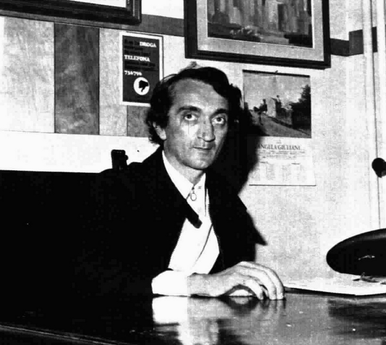 Italian priest Mario Picchi